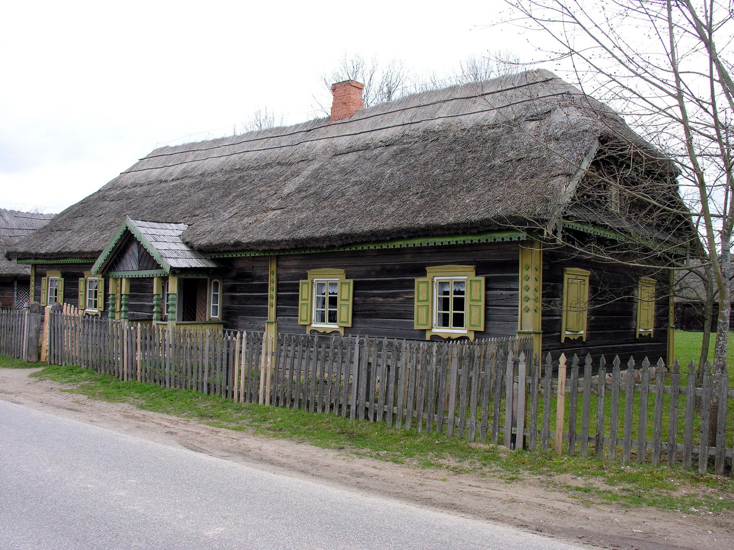 { Rūmas 2007 m. balandžio 21 d., Lietuva